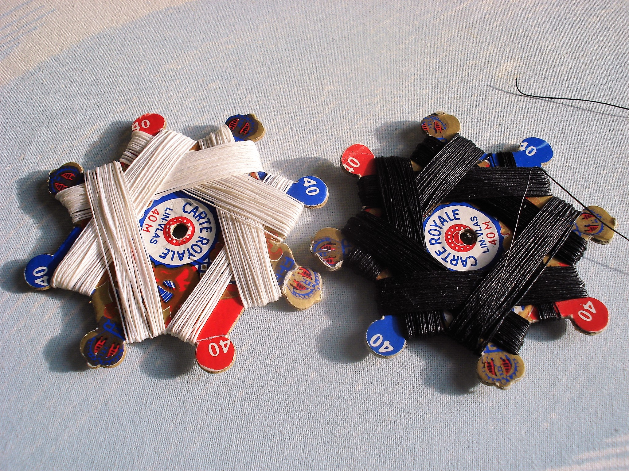 Fil tambour